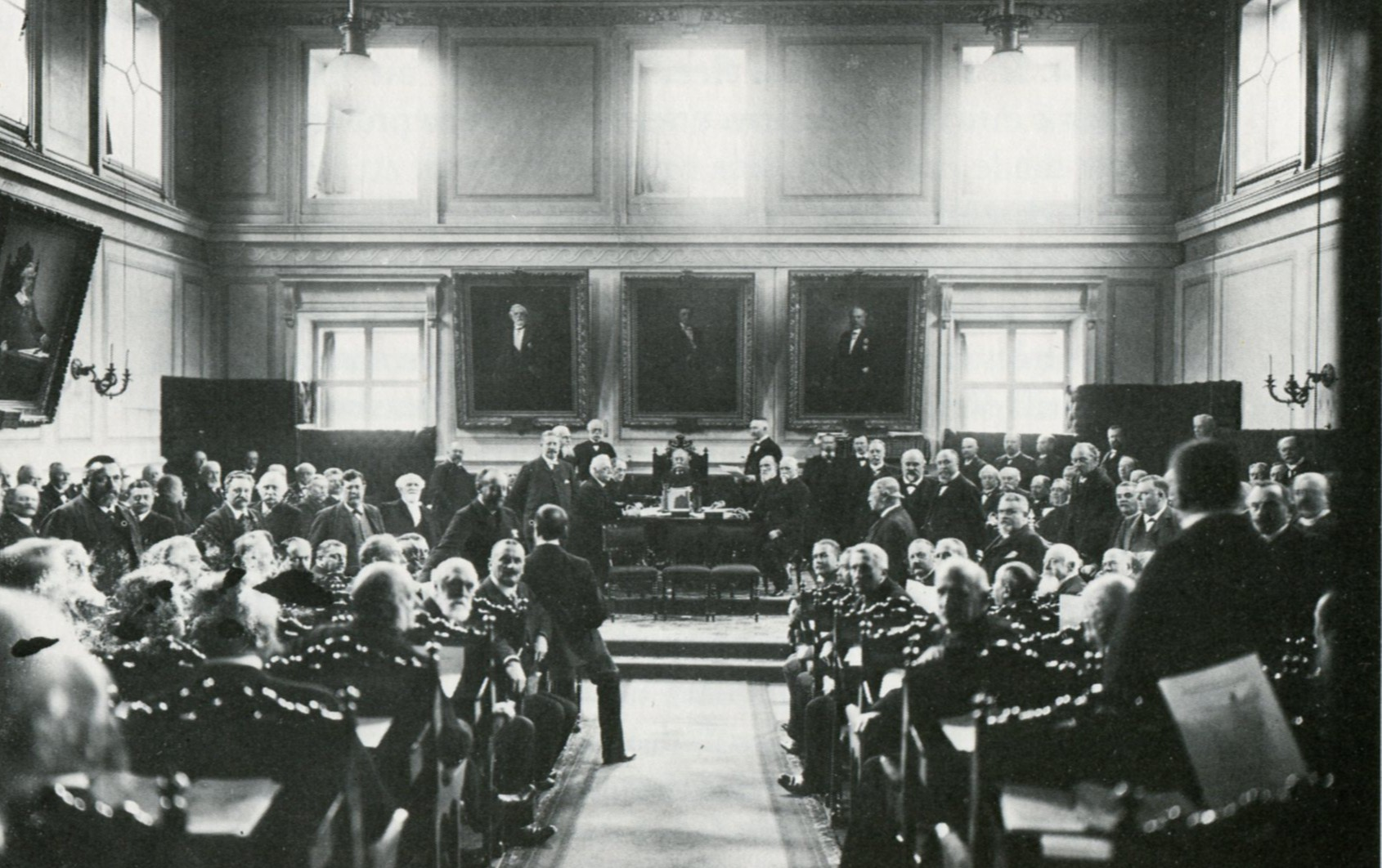 Första kammarens plenisal i Gamla riksdagshuset